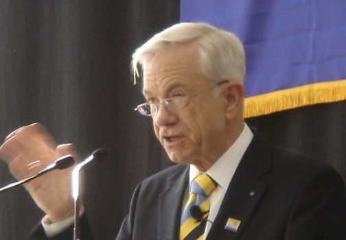 Vortrag bei Rotary Veranstaltung in Wiesbaden